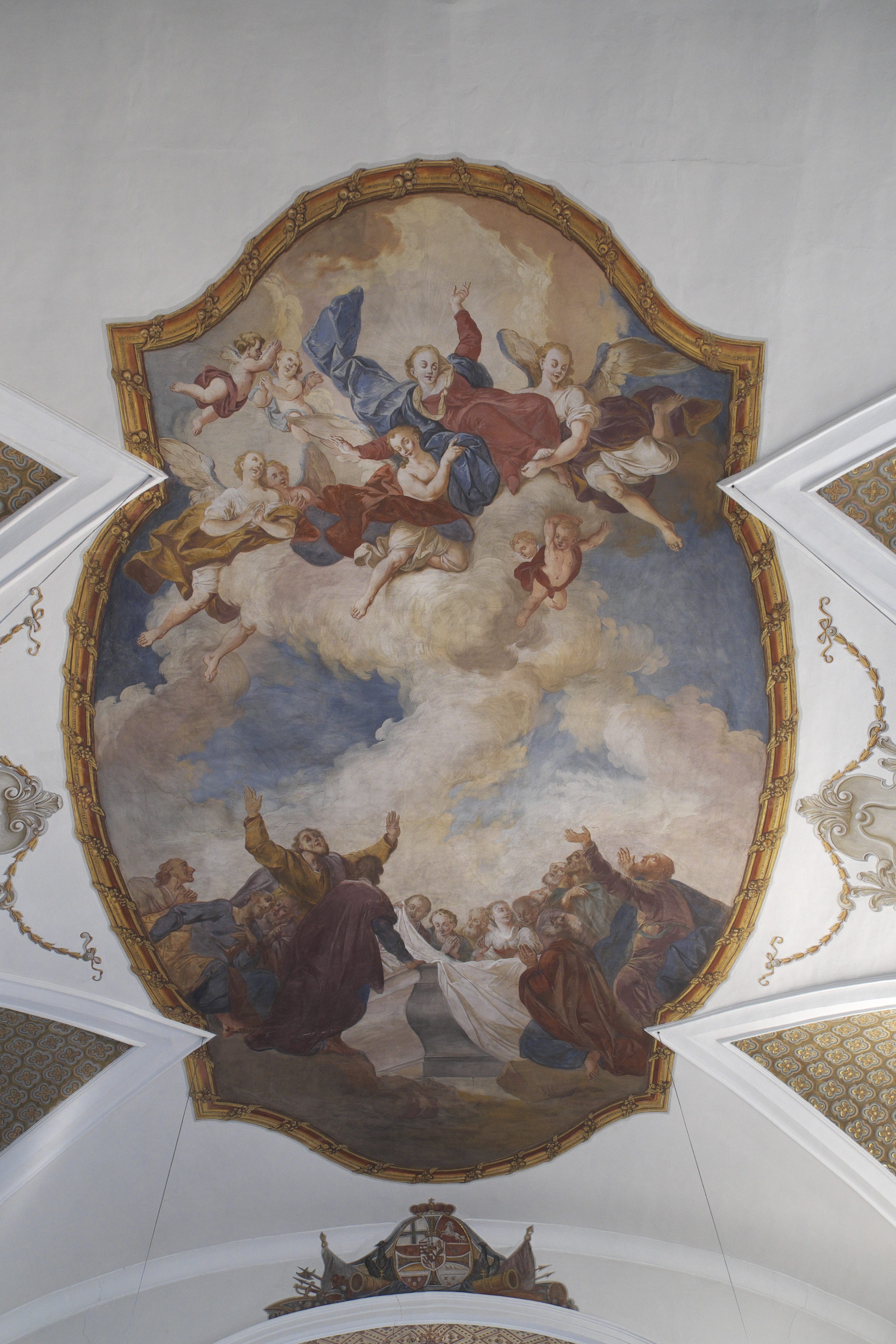 Katholische Pfarrkirche Mariä Himmelfahrt in Klingen (Aichach) im schwäbischen Landkreis Aichach-Friedberg (Bayern/Deutschland), Langhausfresko von Johann Baptist Anwander, von 1791; Darstellung: Mariä Himmelfahrt